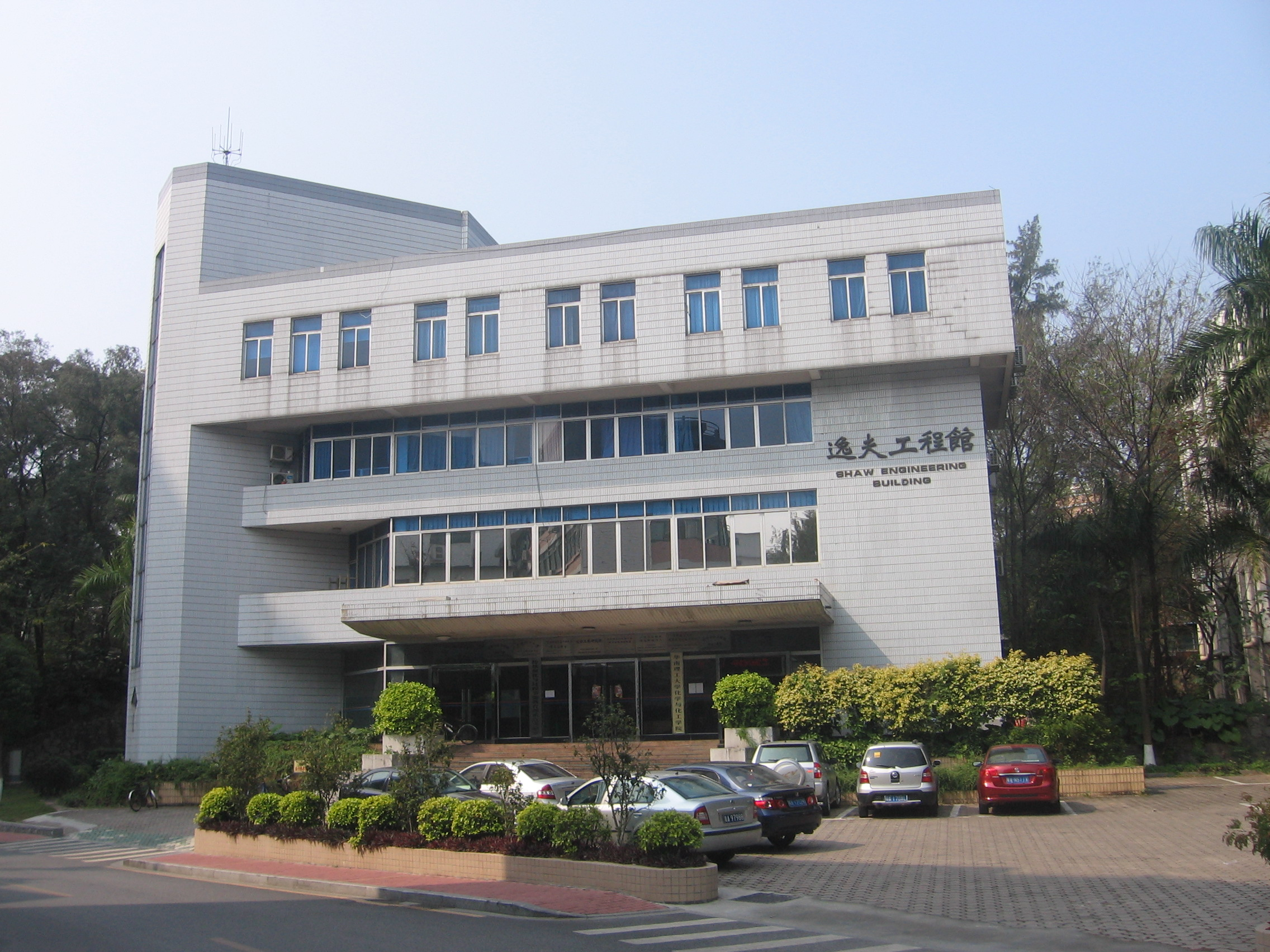 中文（中国大陆）: 位于中国广东省广州市华南理工大学北校区的逸夫工程馆